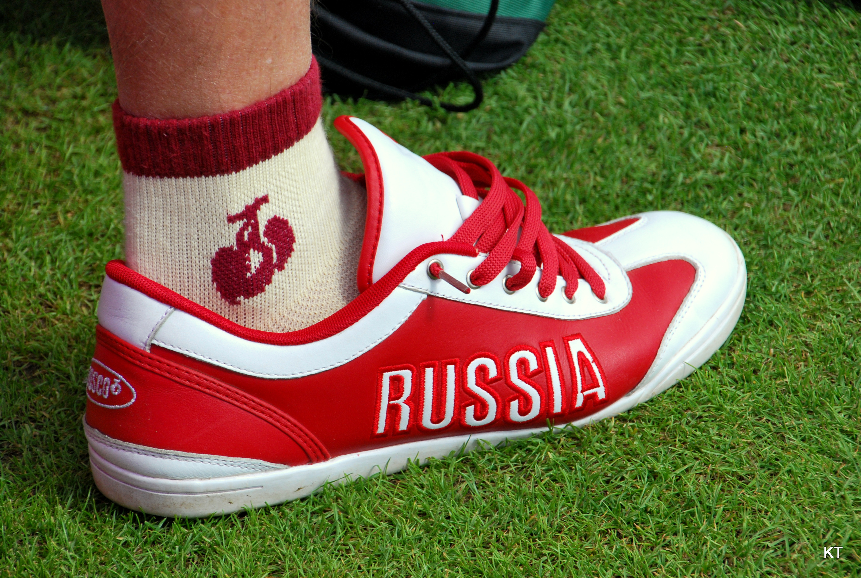 More Russian kit